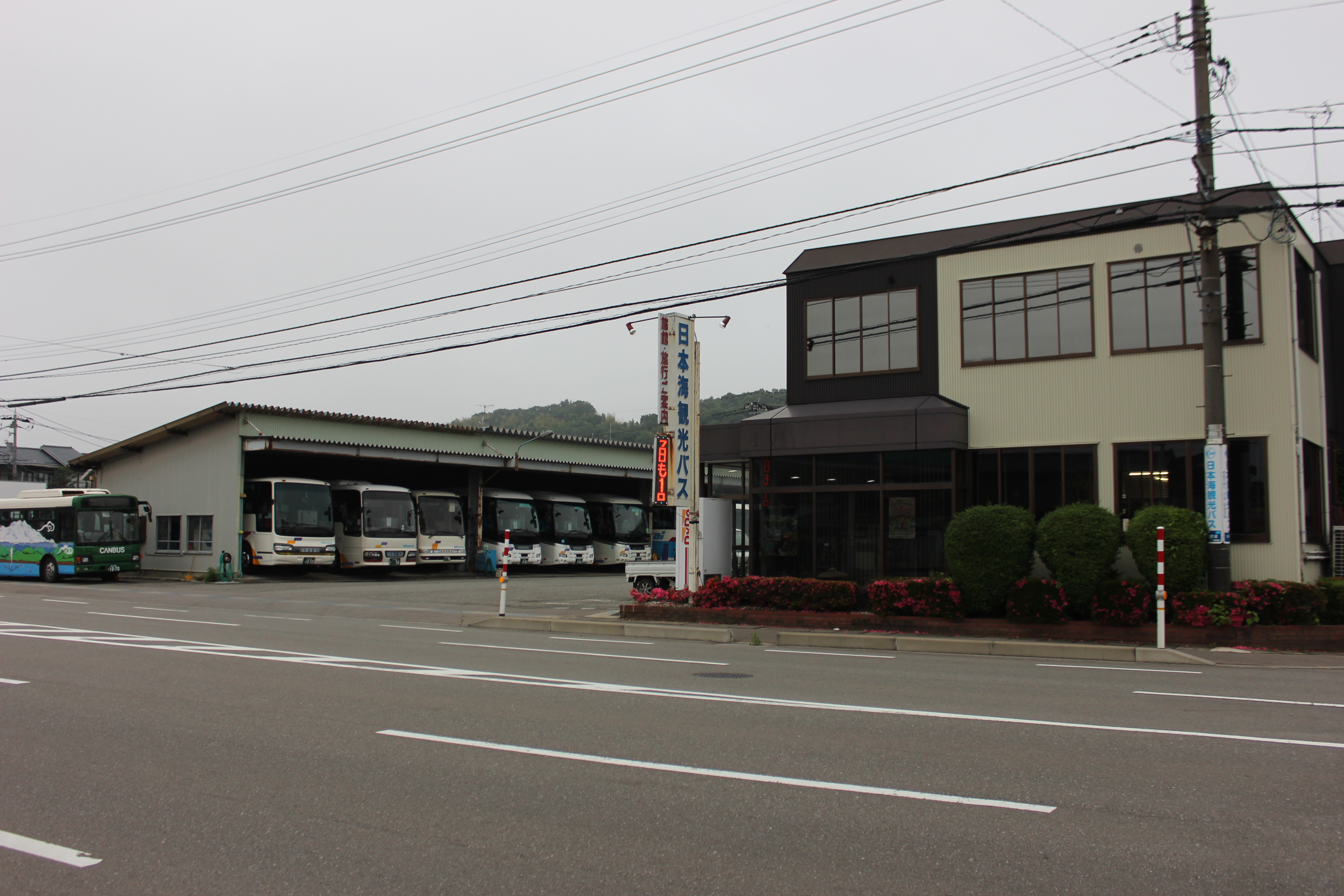 日本海観光バス本社（石川県加賀市） Canon EOS Kiss X5